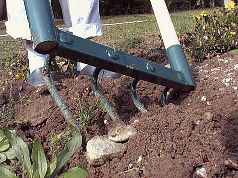 Un travail écologique au jardin